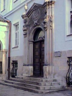 Kolegium jezuitów - Kraków ul. M. Kopernika 26 (portal)